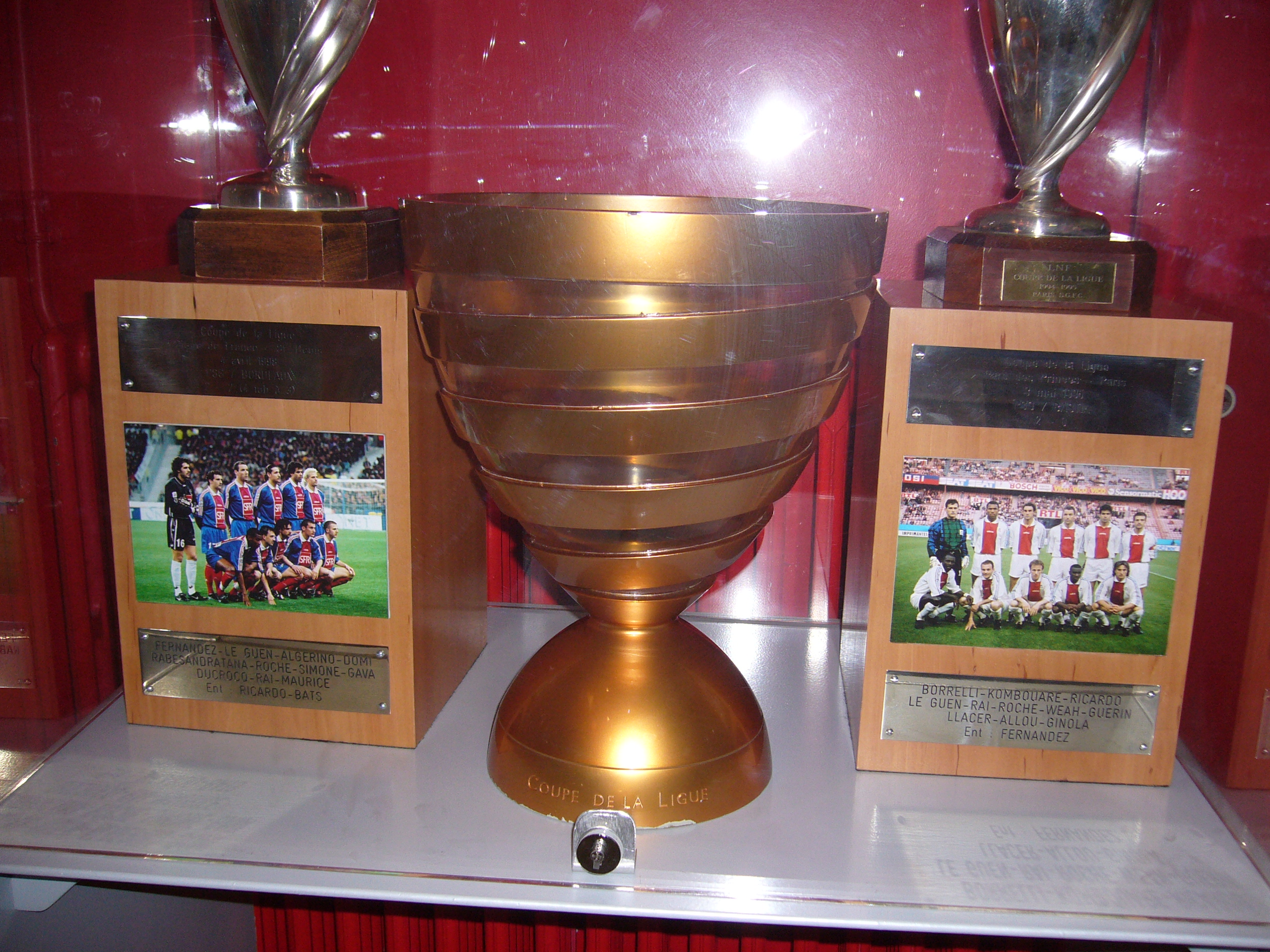 Coupes de la Ligue remportées par le PSG. Visite du Parc des Princes lors des Journées du Patrimoine 2008.